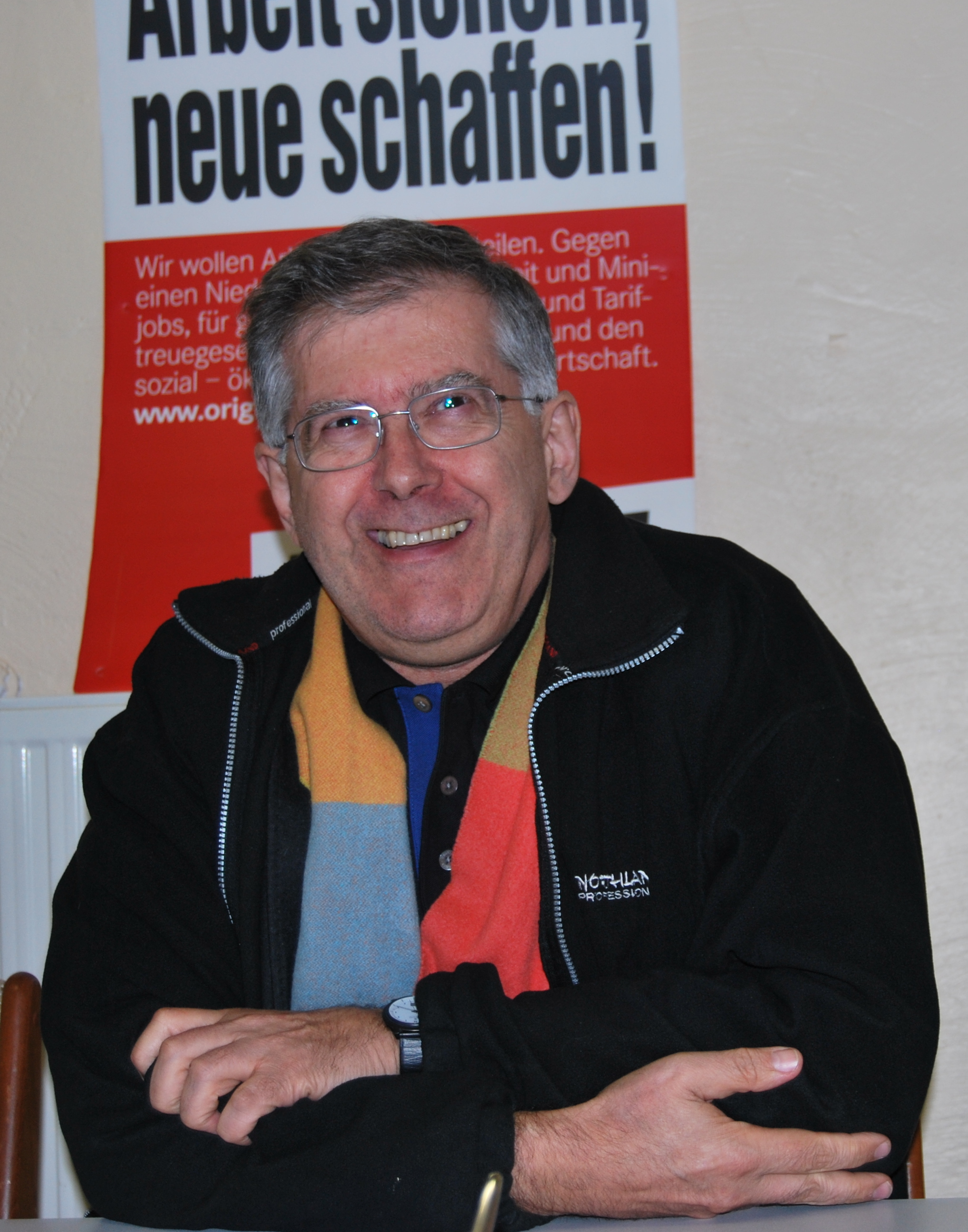 Am 15.04.2010 besuchte der Chefvolkswirt der Bundestagsfraktion DIE LINKE Michael Schlecht Soest. Die Landtagskandidaten der LINKEN im Kreis Soest Elisabeth Umezulike, Michael Bruns und Manfred Weretecki forderten anlässlich der Veranstaltung zur Wirtschaftspolitik die Überführung der Privatbanken in öffentliche Hand und die Einführung der Millionärssteuer.